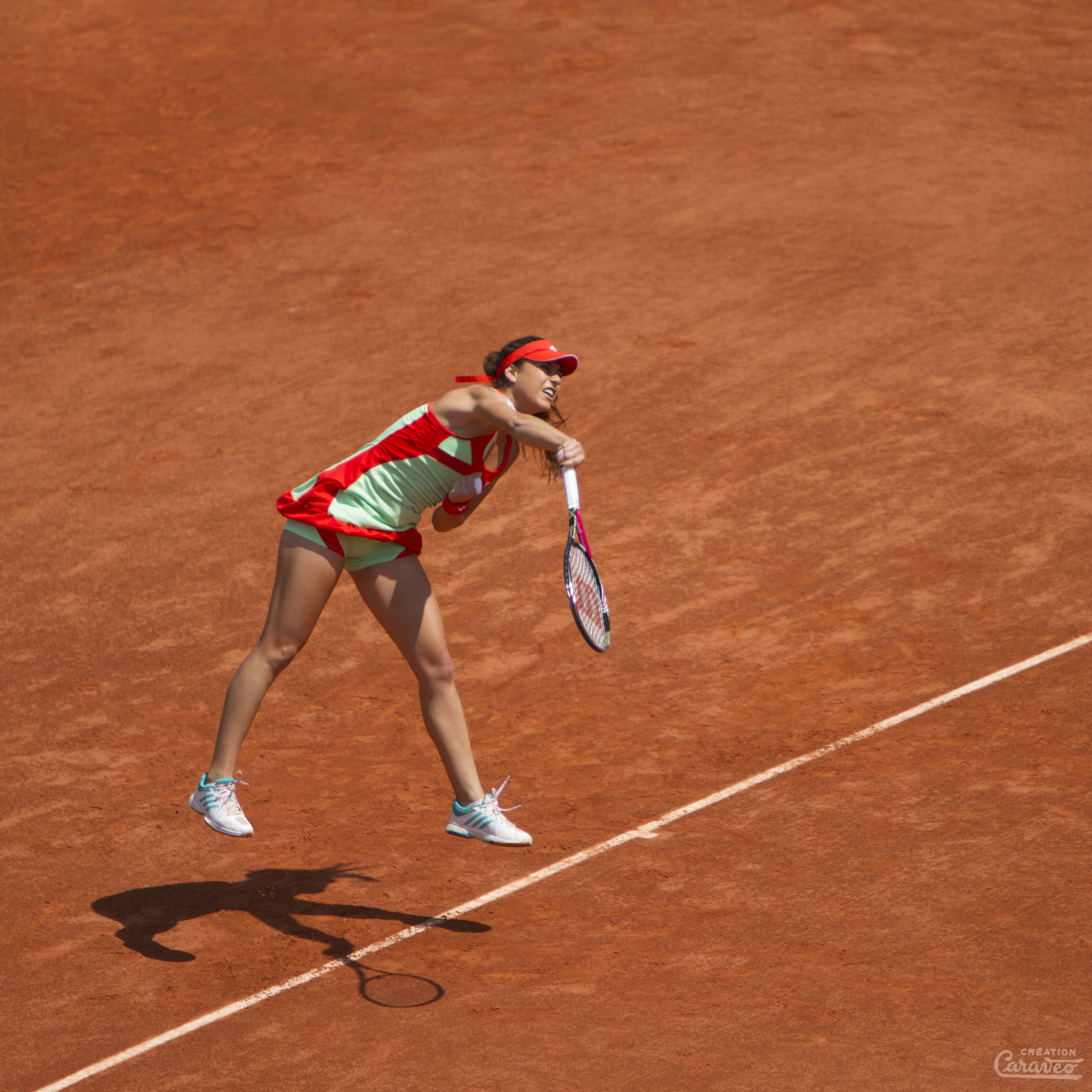 Sorana Cîrstea, Roland-Garros 2012.